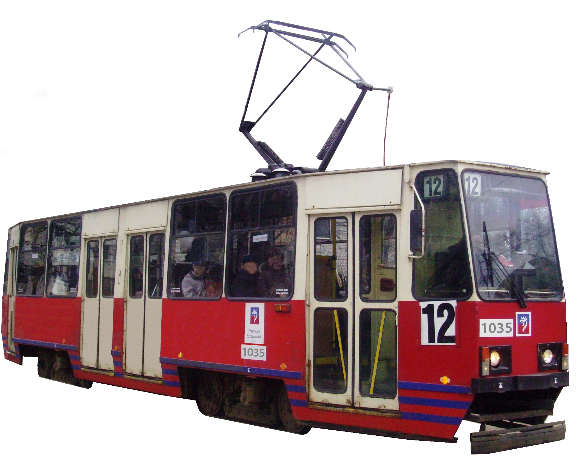 Rekonstrukcja wyglądu szczecińskiego tramwaju typu 106Na. Rekonstrukcję wykonano na podstawie zdjęć archiwalnych ze strony phototrans.eu. Wykorzystano zdjęcie: File:Konstal 105Na 732, tram line 12, Szczecin, 2011.jpg autorstwa user:Szczecinolog.